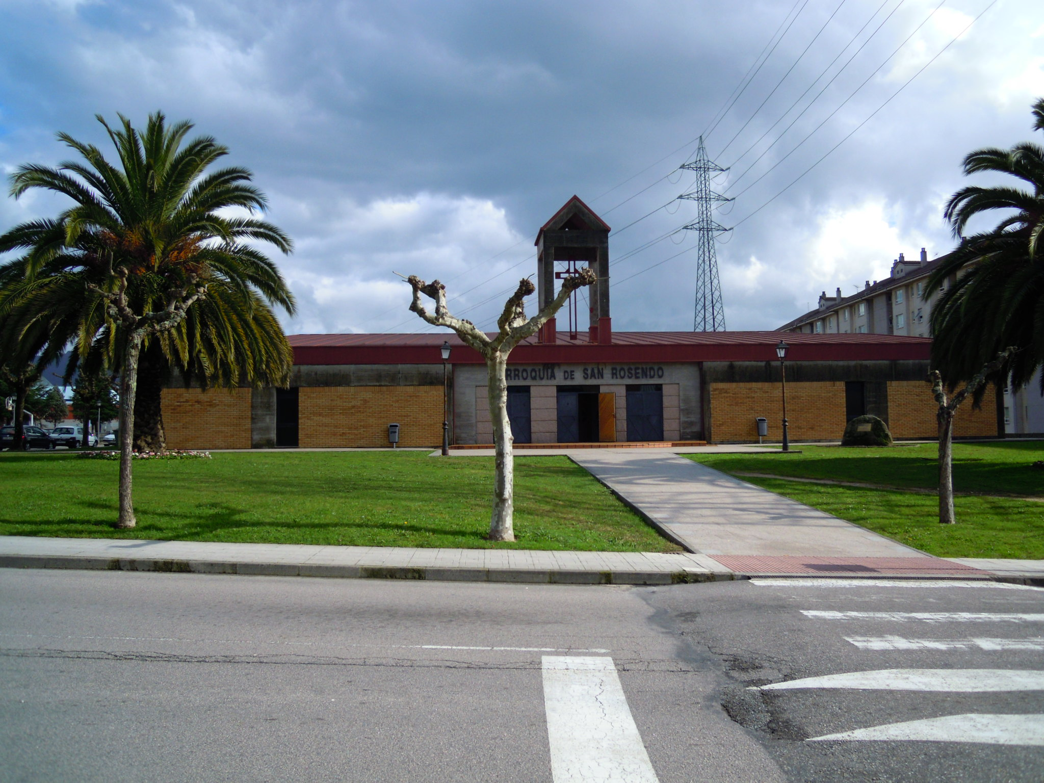 Igrexa parroquial de San Rosendo de Torneiros (O Porriño).